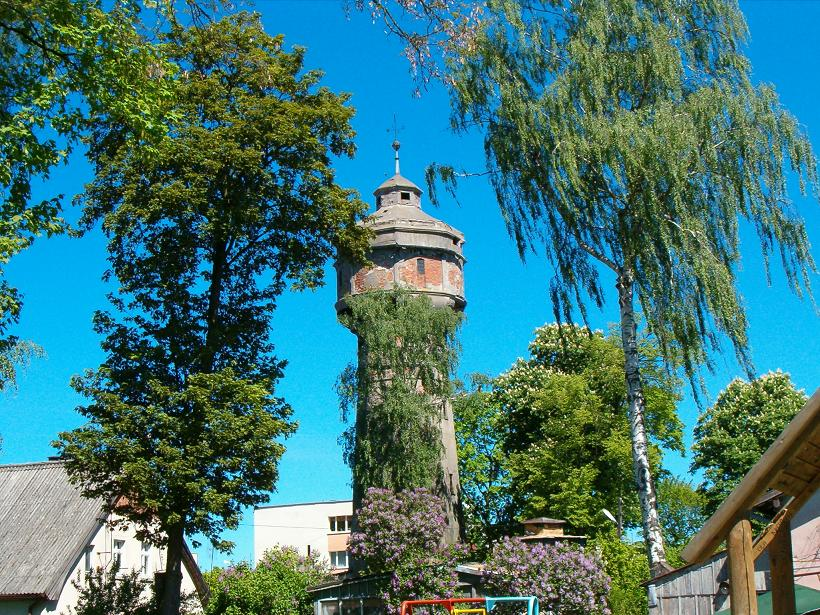 Nowy Dwór Gdański, ul. Tuwima 5 - miejska wieża ciśnień, 1909